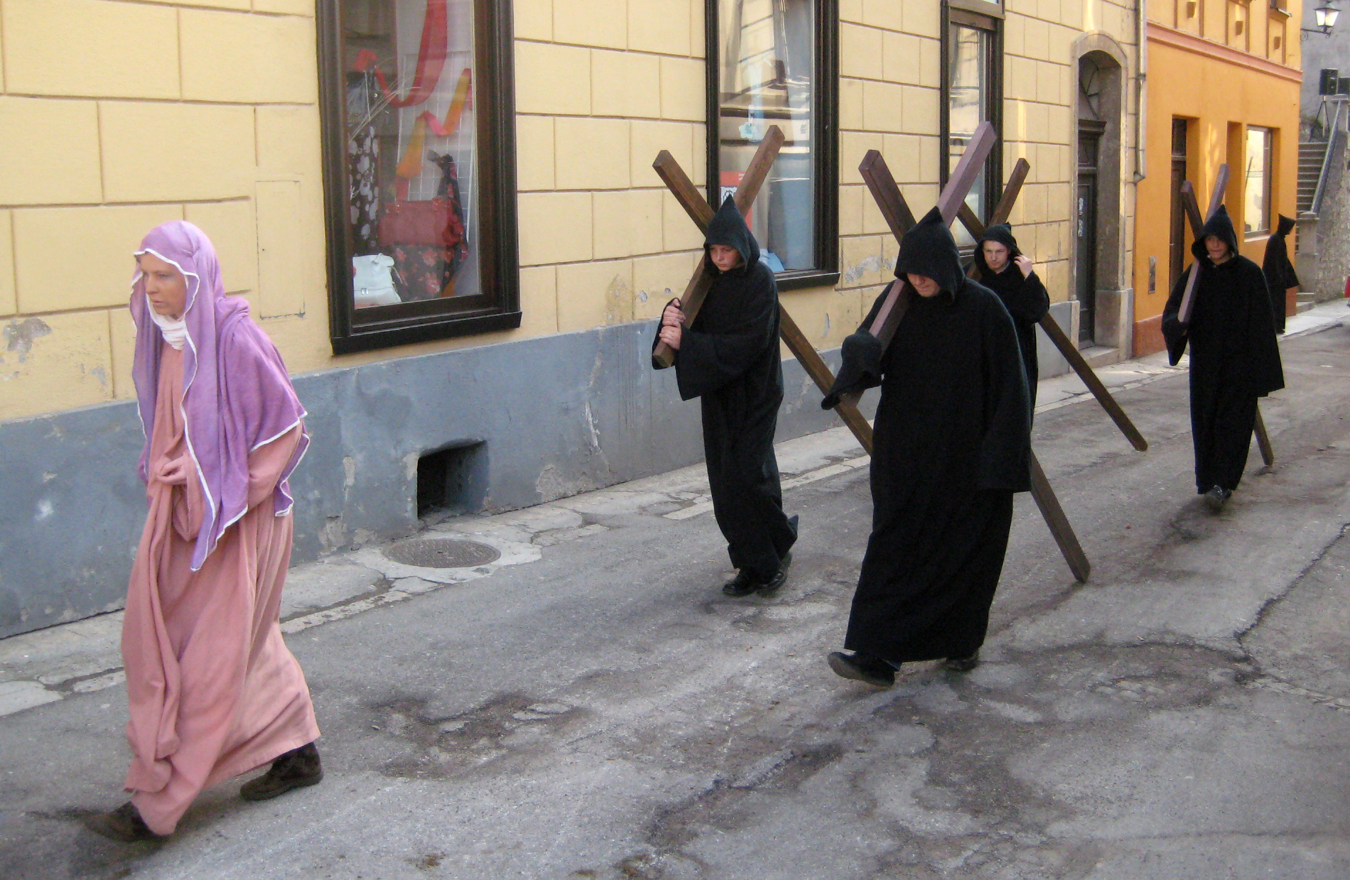 Škofjeloški pasijon (Processio Locopolitana), izvedba 2009 v Škofji Loki